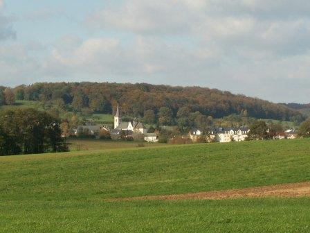 Ötringen vom "Roude Bësch" aus